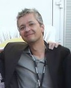 Pierre Coffin au Festival International du Film d'Animation d'Annecy le 12 juin 2013